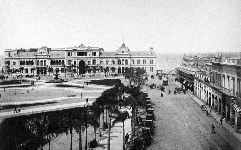 Plaza de la Victoria (actual Plaza de Mayo). Puede observarse en el fondo la Casa Rosada y el Río de la Plata.